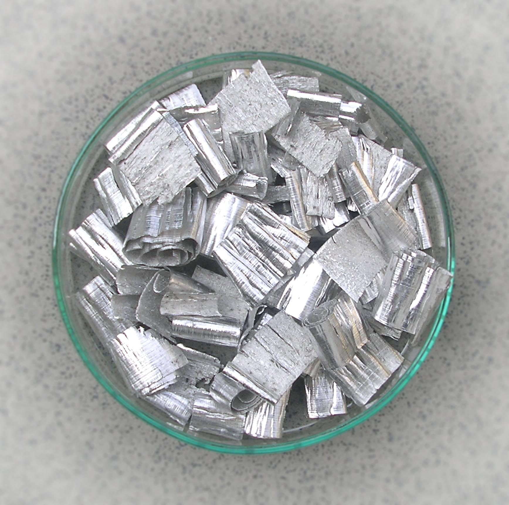 Magnesium